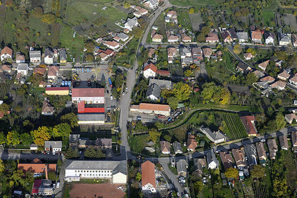 Szücsi légi fotó